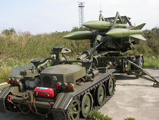 Stevnsfortet, Hawk launcher og loader